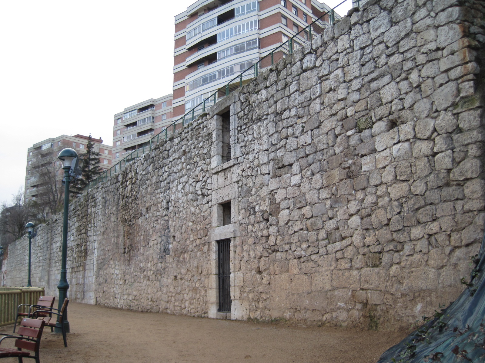 Vista de uno de los muros del palacio de la Ribera, en Valladolid (España).